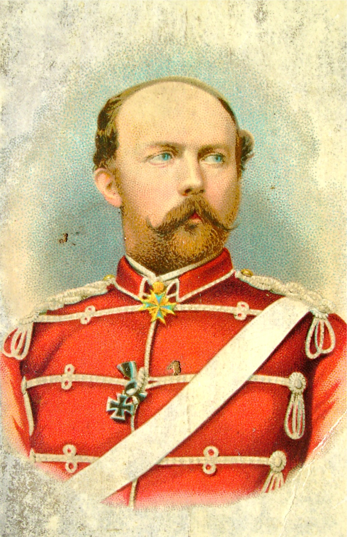 Prinz Friedrich Carl von Preußen